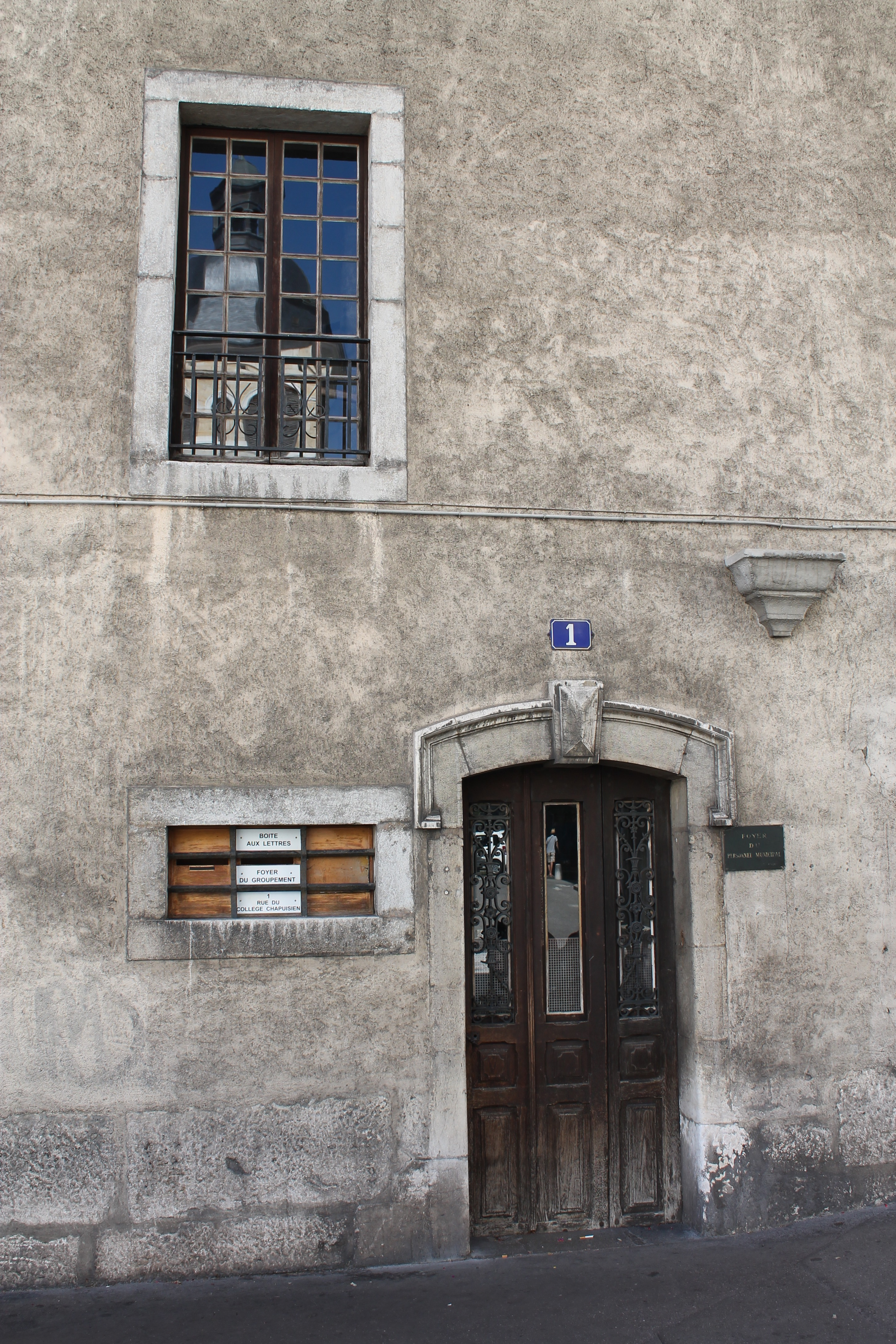 Porte d'entrée du 1, rue du collège chapuisien et reflet du clocher de l'église Saint-Maurice, à Annecy